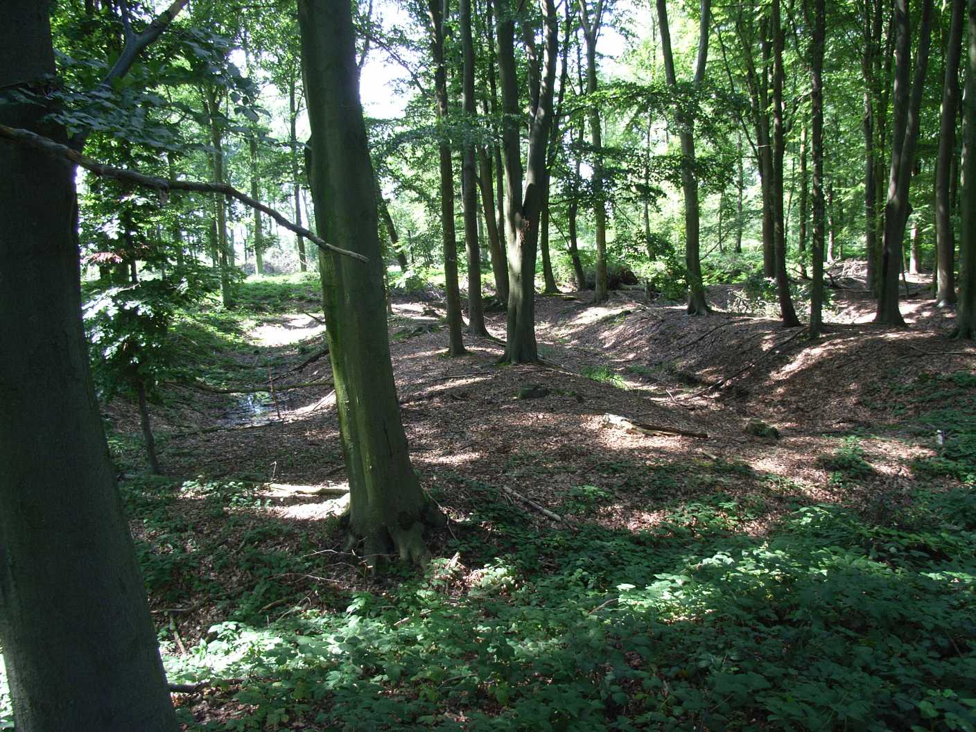 Bodenwellen im Erkelenzer Wahnenbusch